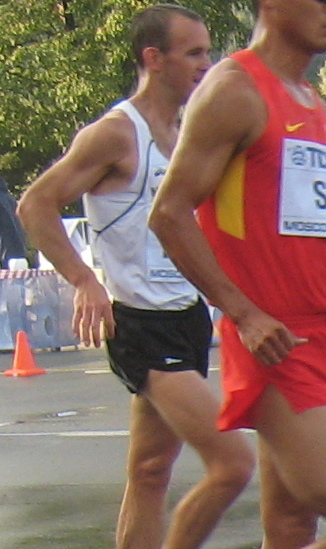 Чемпионат мира по лёгкой атлетике 2013. Ходьба 50 км, мужчины. Новозеландский ходок Квентин Рю, китаец Тянфень Си, сальвадорец Эмерсон Эрнандес, эквадорец Андрес Чочо